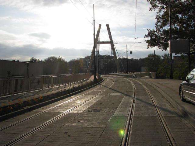 Most Władysława Jagiełły